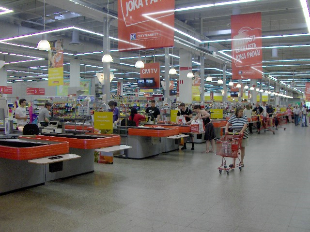 Citymarket Itäkeskus, Helsinki